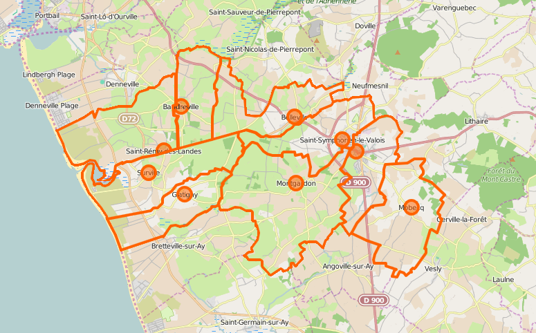 La Haye (Manche) découpage de la commune nouvelle